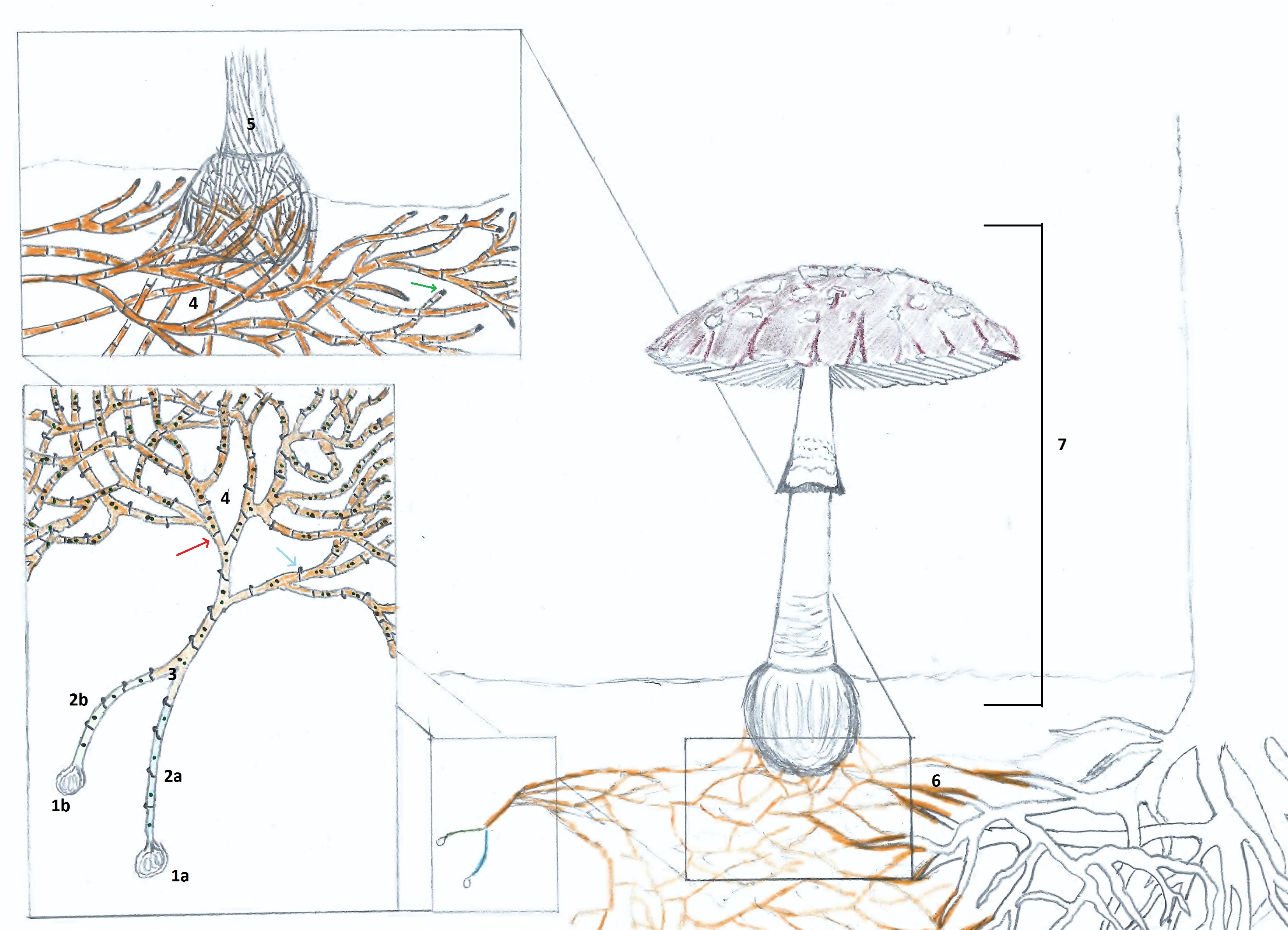 Amanita generoko onddo baten mizelioaren garapen faseak non parte desberdinak ikusi daitezkeen. 1. Esporak (a eta b). 2. a eta b esporetatik hozitutako mizelio primarioak. 3. Ernalketa, somatogamia. 4. Mizelio sekundarioa eta beronen egitura garrantzitsu batzuk (gorriz holtza, urdinez fibula eta berdez mizelioaren punta aktiboak). 5. Karpoforoa (kasu honetan basidiokarpoa) sortuko duen mizelio tertziarioa. 6. Onddoaren mizelioak zuhaitz batekin sortutako mikorrizazioa. 7. Amanita spp. karpoforoa (basidiokarpoa).